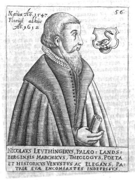 Bildnis Nikolaus Leutinger († 1612)